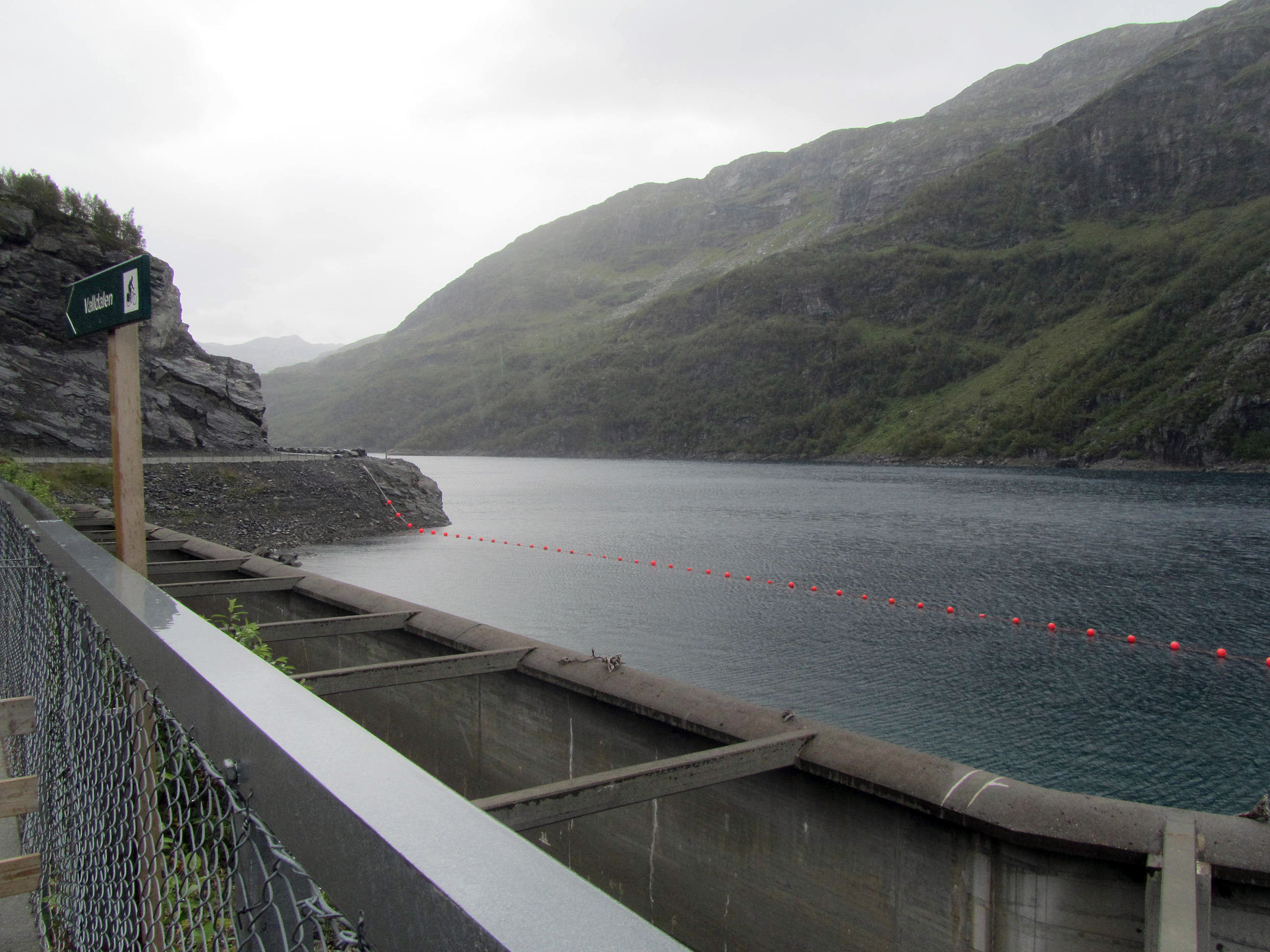 Valldalsvatnet ved dæmningen i sydenden